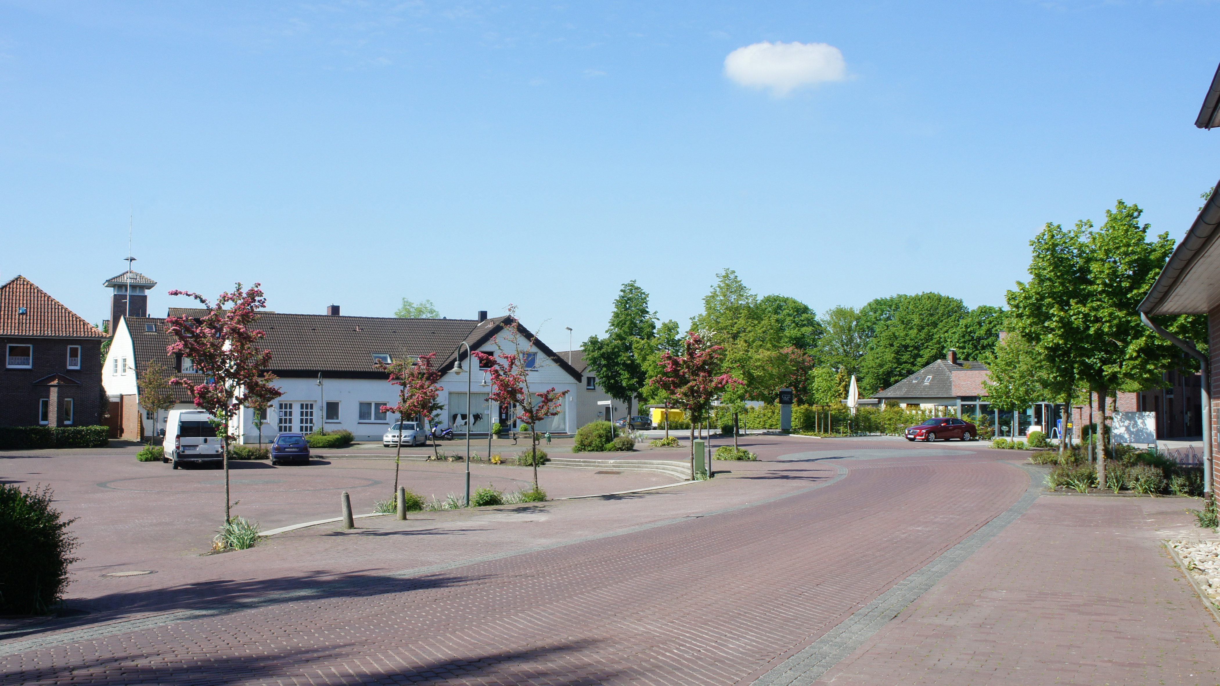 Der Marktplatz in Großenmeer, Landkreis Wesermarsch